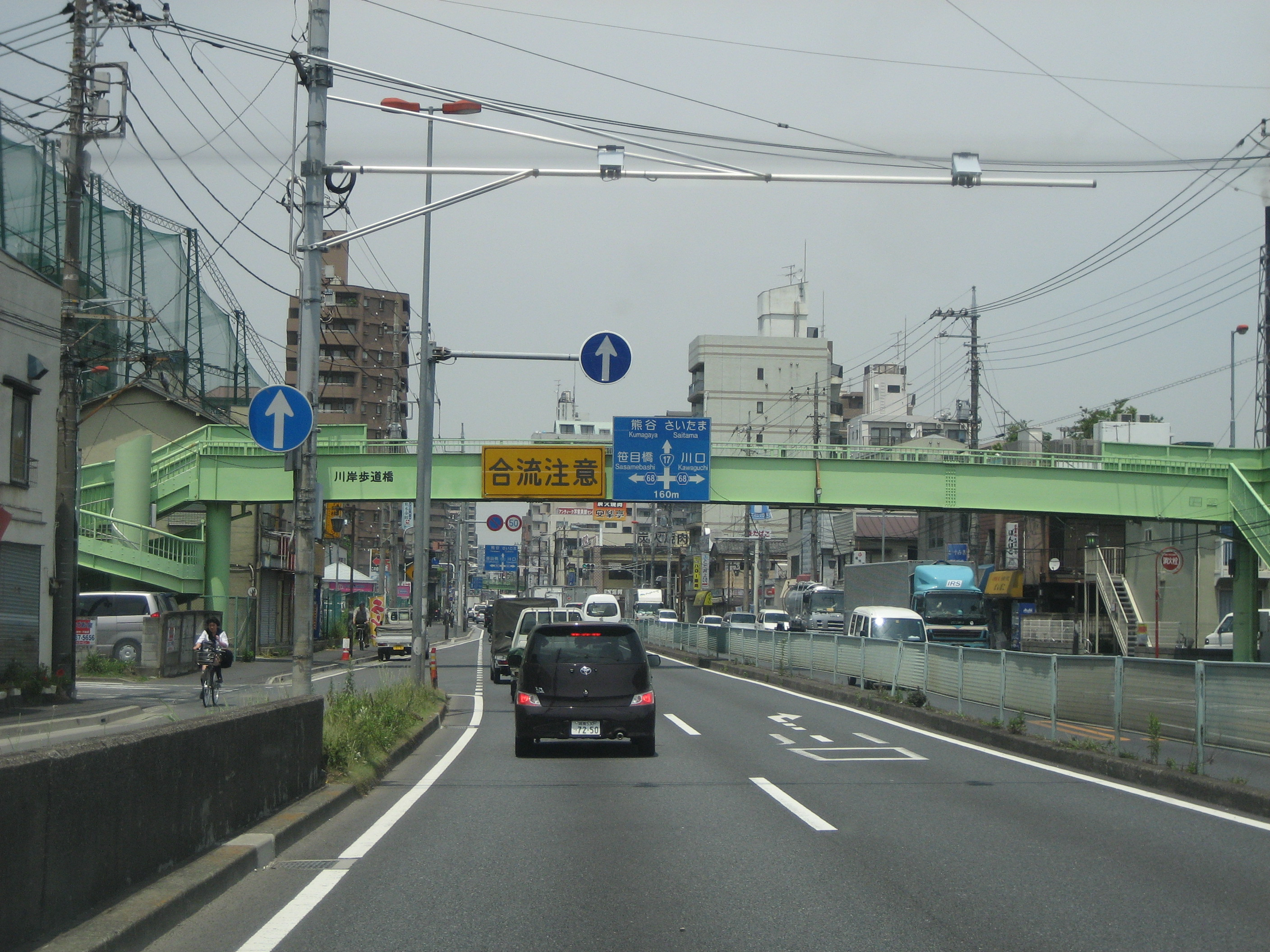 国道17号線戸田橋付近